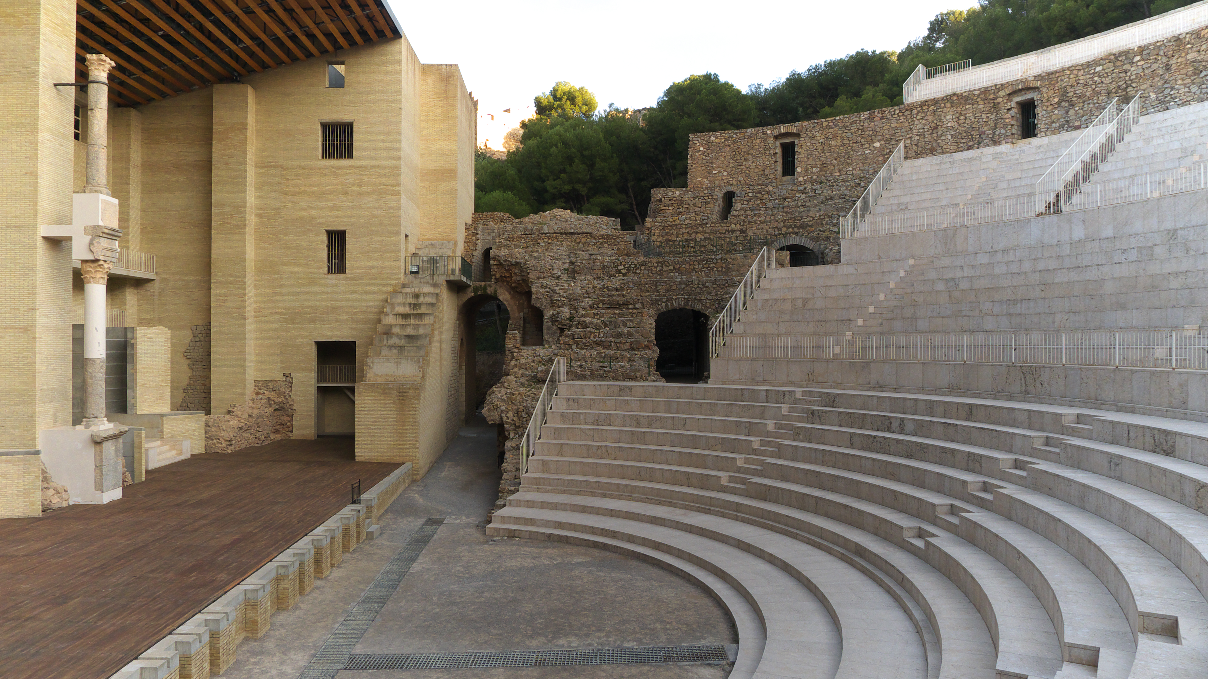 El teatro romano de sagunto (50 d.C.) en la actualidad